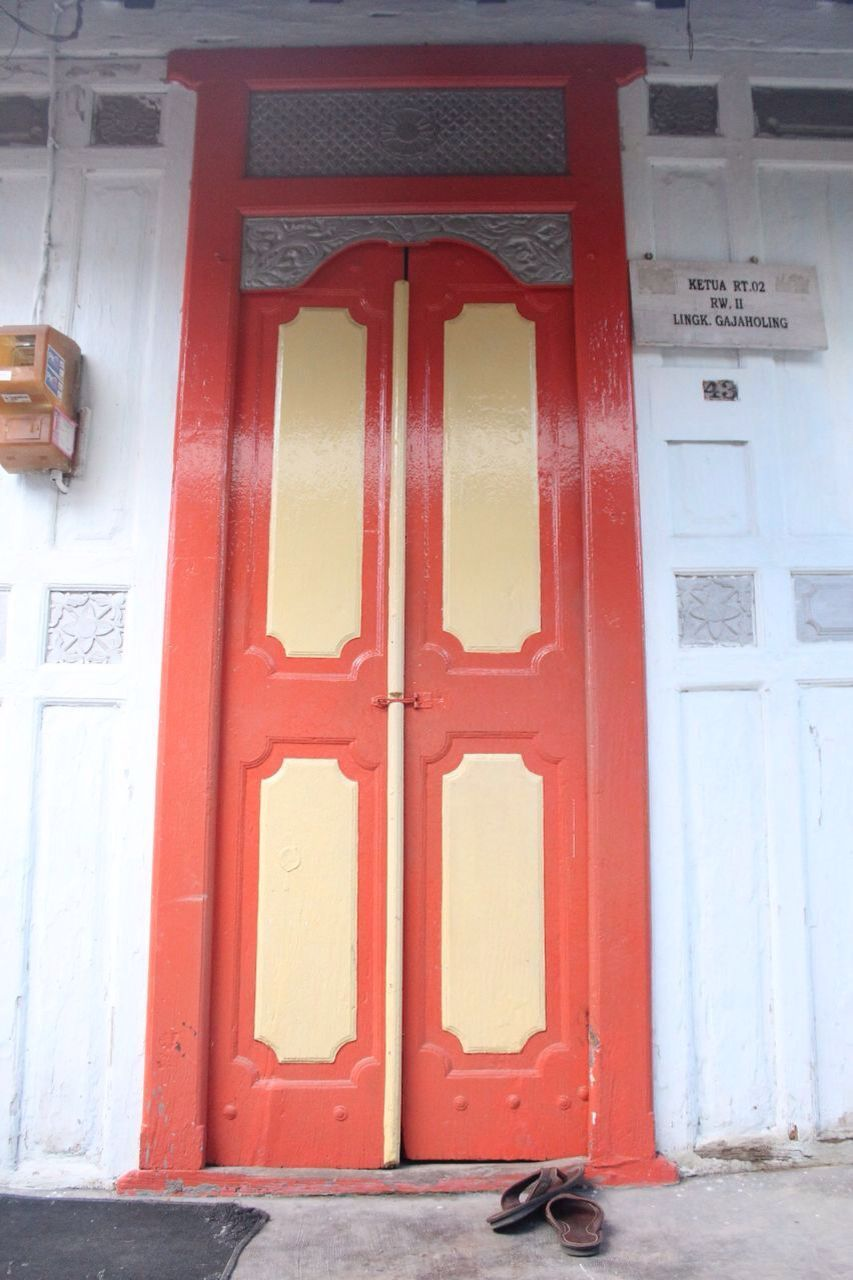 Rumah tradisional Osing, di Kampong Wisata Temenggungan masih terdapat beberapa rumah tradisional Suku Osing